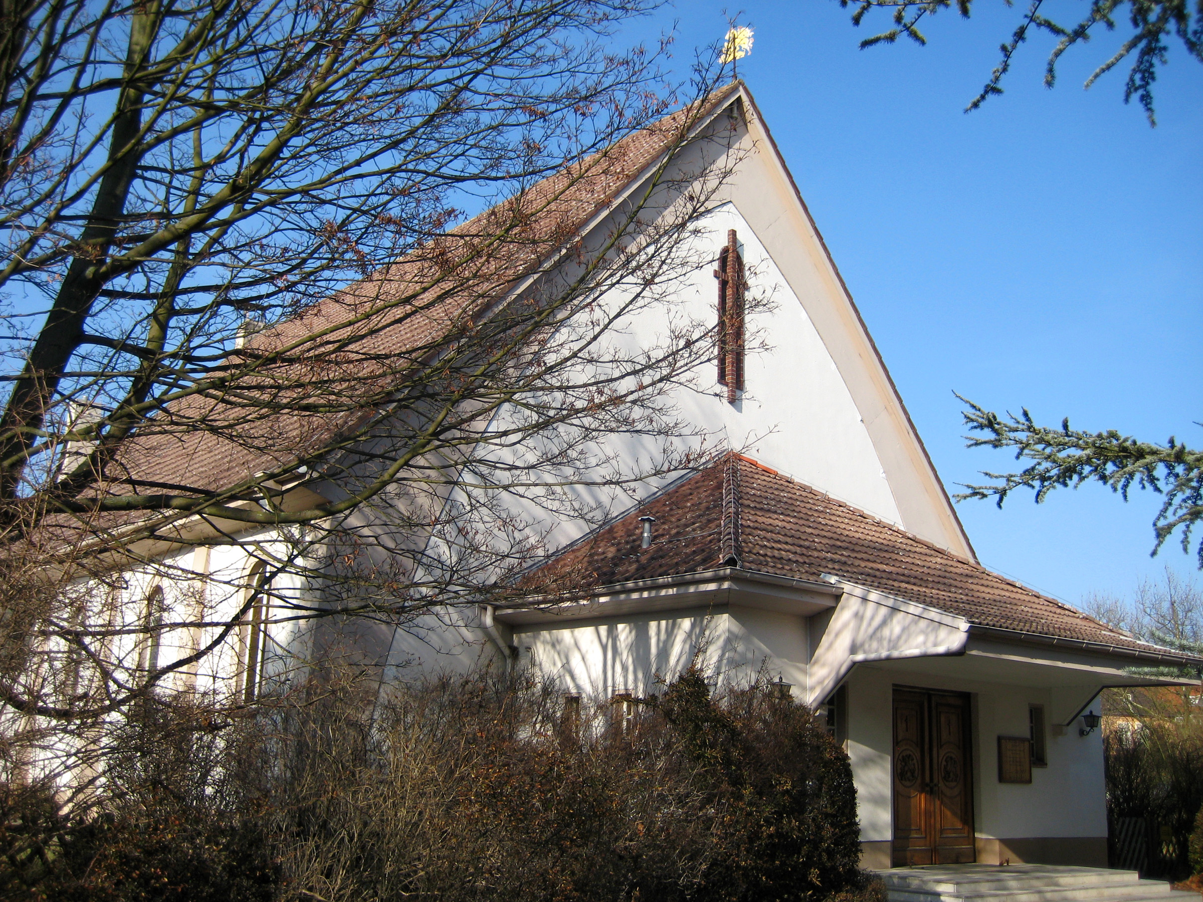 St. George-Kirche